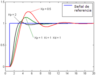 PV en funcion del tiempo (proporcional)